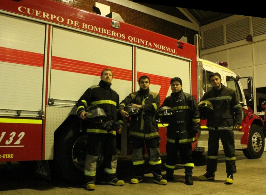 Guardia Nocturna Primera Compañia, año 2012